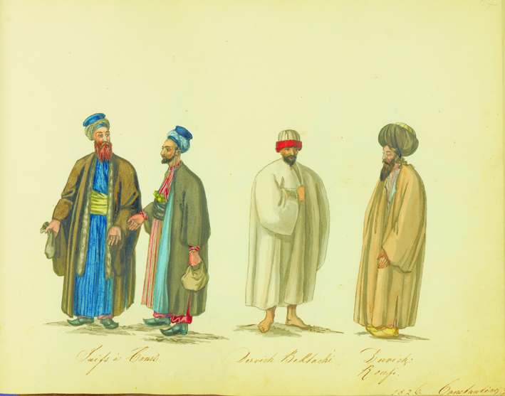 Juifs a Const. Dervich Bektach. Dervich Rousi